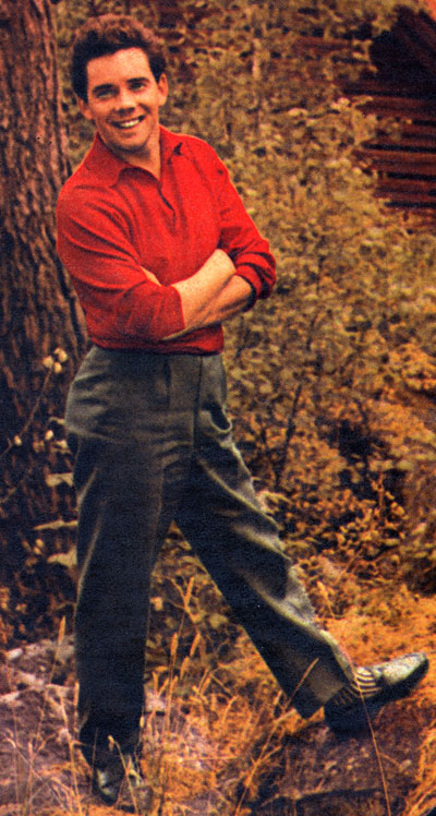 Sven-Gösta Jonsson